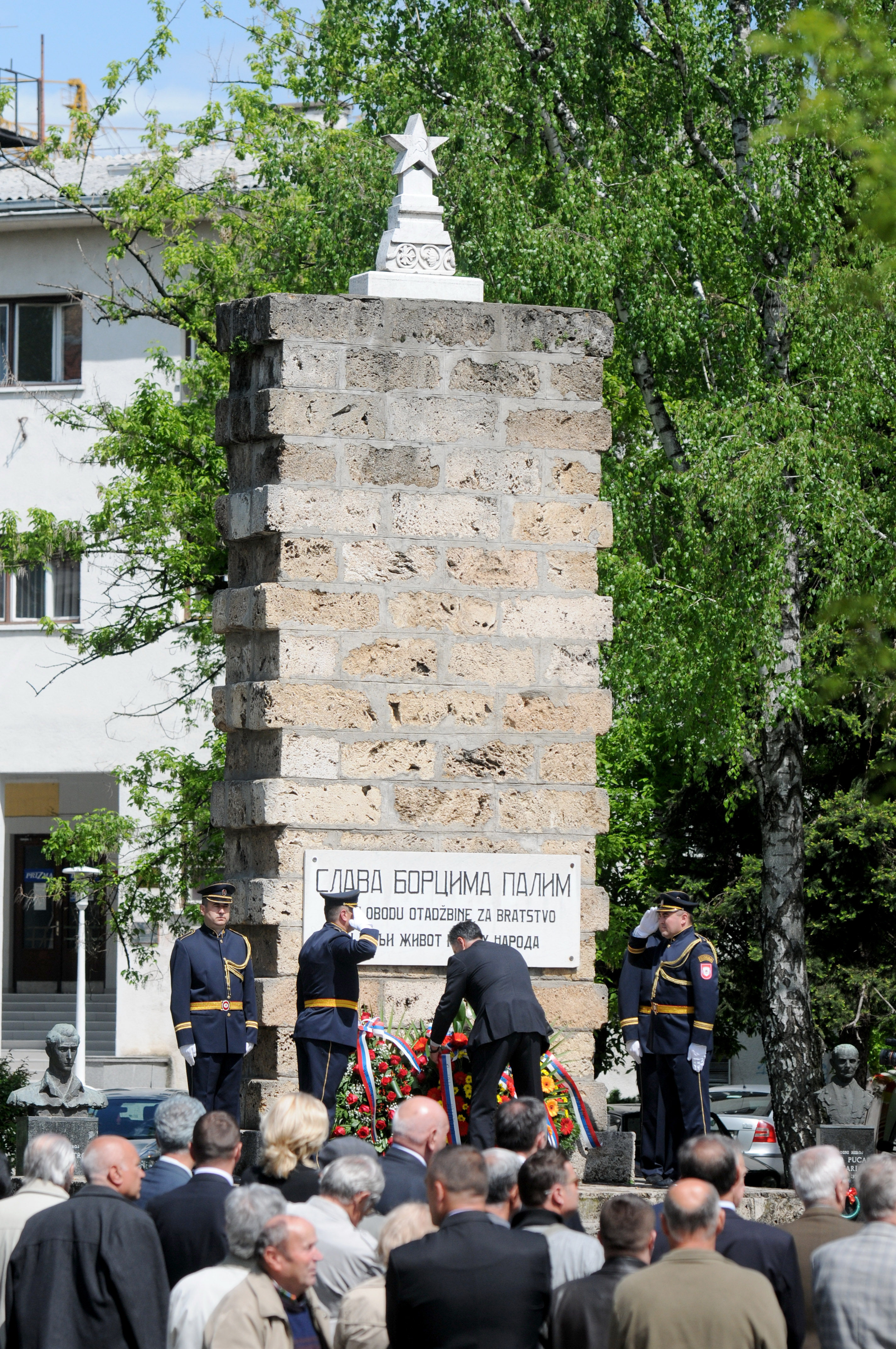 spomenik palim borcima nora banjaluka